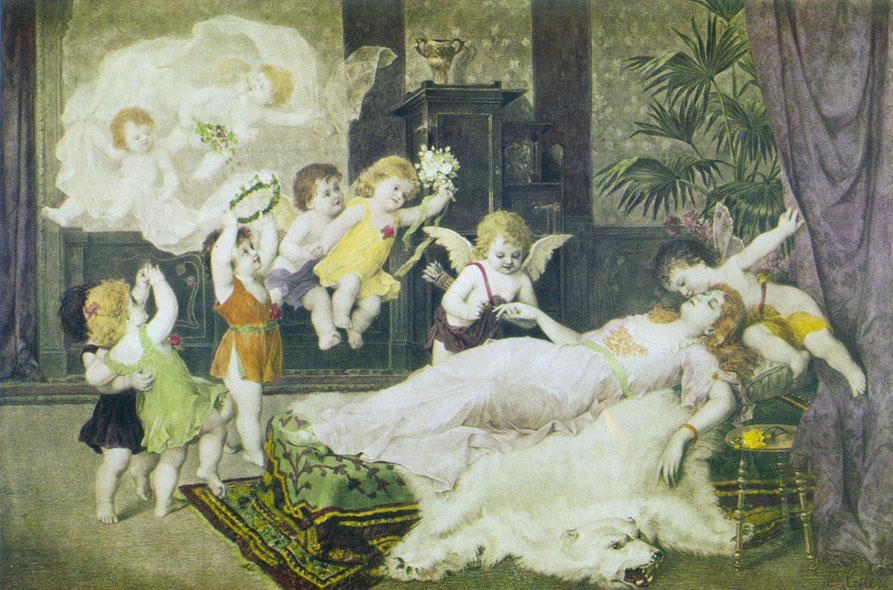 Hochzeitstraumtitle QS:P1476,de:"Hochzeitstraum"